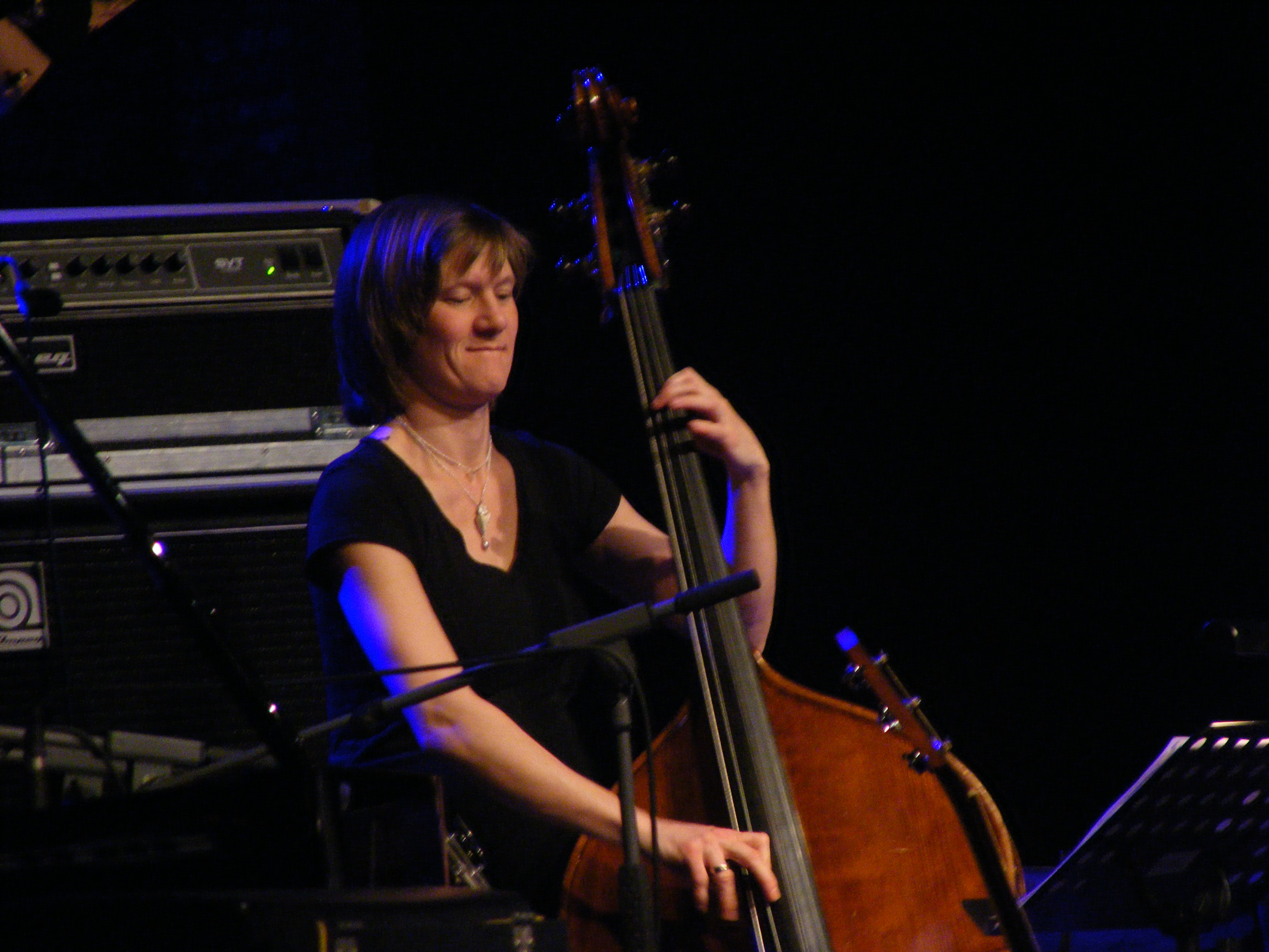 Auftritt beim Jazzfestival St. Ingbert in der Formation "Nils Landgren - Respect" am 27.03.2009